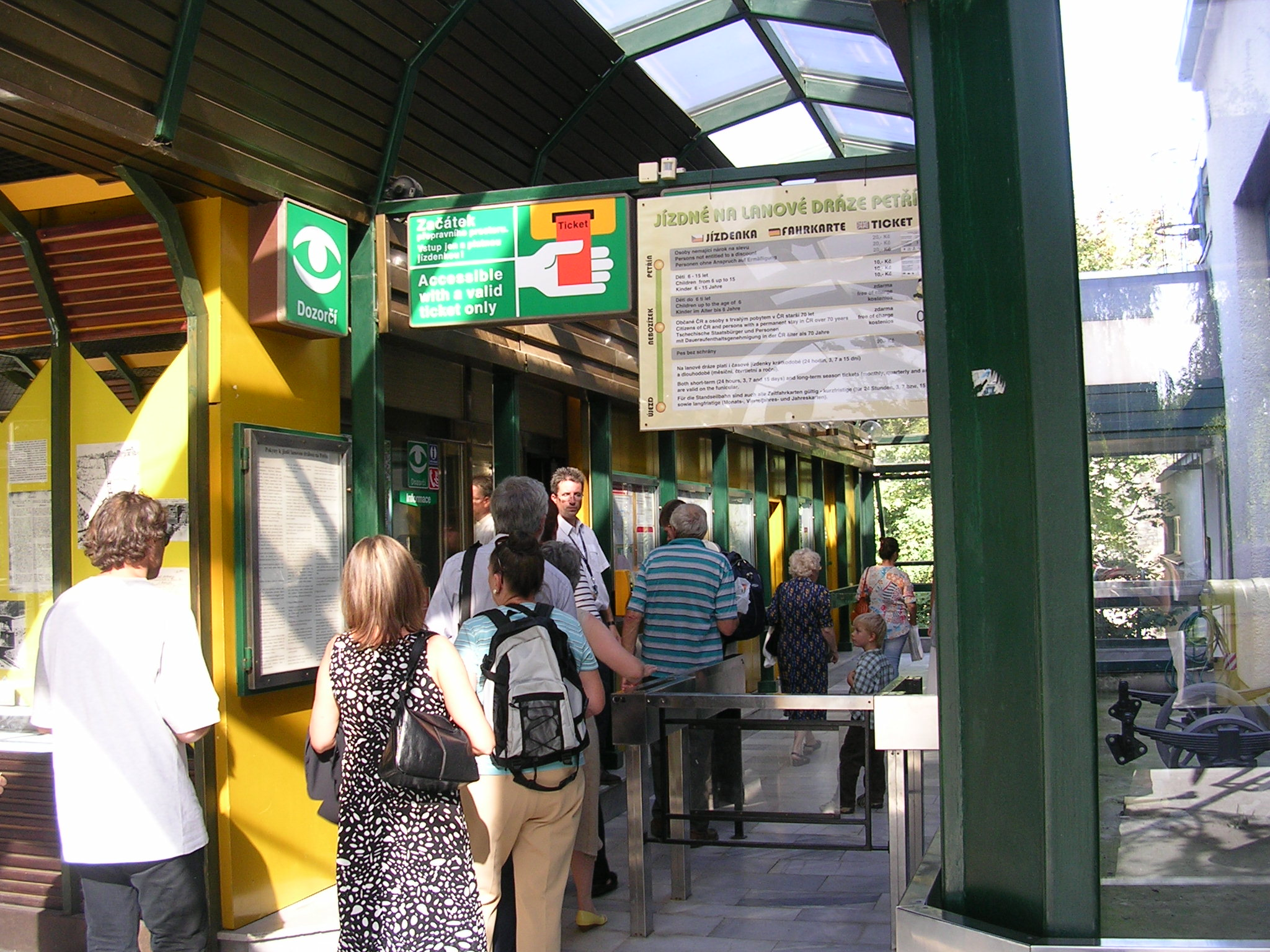 Praha, lanová dráha na Petřín, vstupní hala stanice Petřín